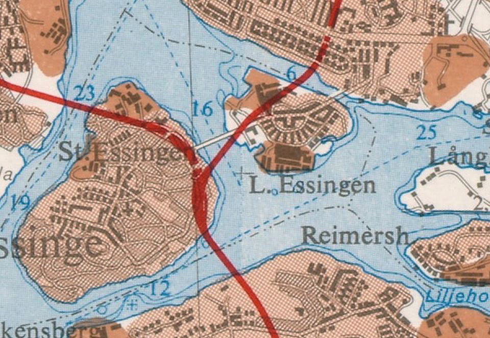 Essingeöarna, Essingebroarna och Essingeleden med den planerade Brommagrenen